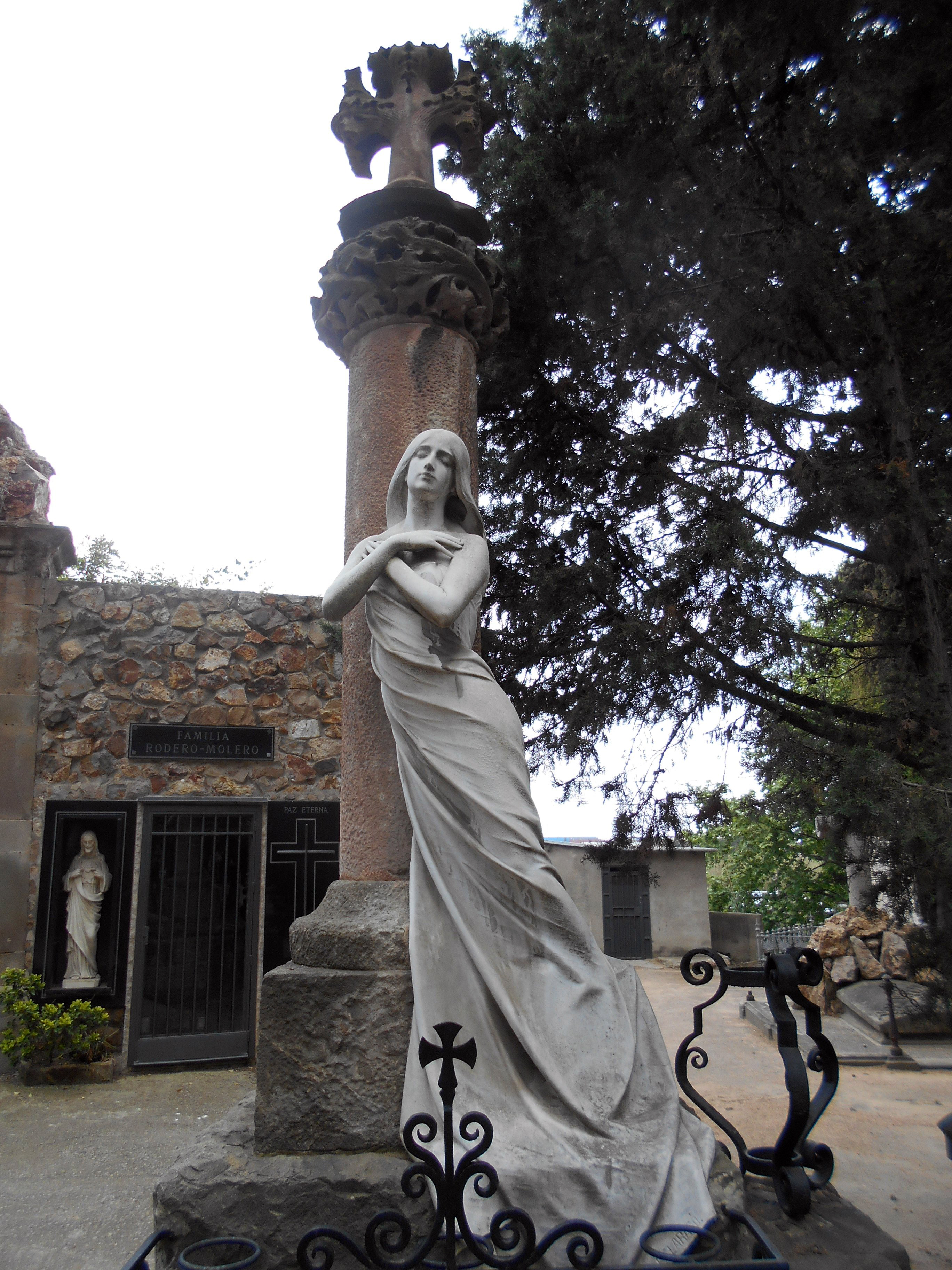 Sepultura Leal Da Rosa, de Leandre Albareda y Enric Clarasó.